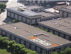 Sede central de Applus+ en Bellaterra, Barcelona